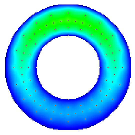 Druckverlauf im Lagerspalt eines gekippten Lagerrings